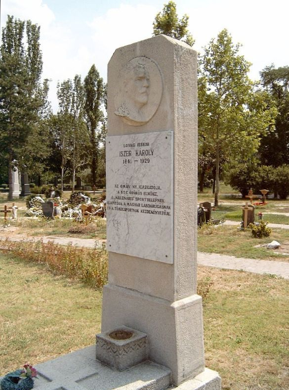 Iszer Károly (Bp., 1860. jan. 8. – Bp., 1929. okt. 28.): újságíró, sportszervező, osztrák–magyar vasúttársasági igazgató sírja Budapesten. Kerepesi temető: 43-16-16 [szobrász: Csiszér János].